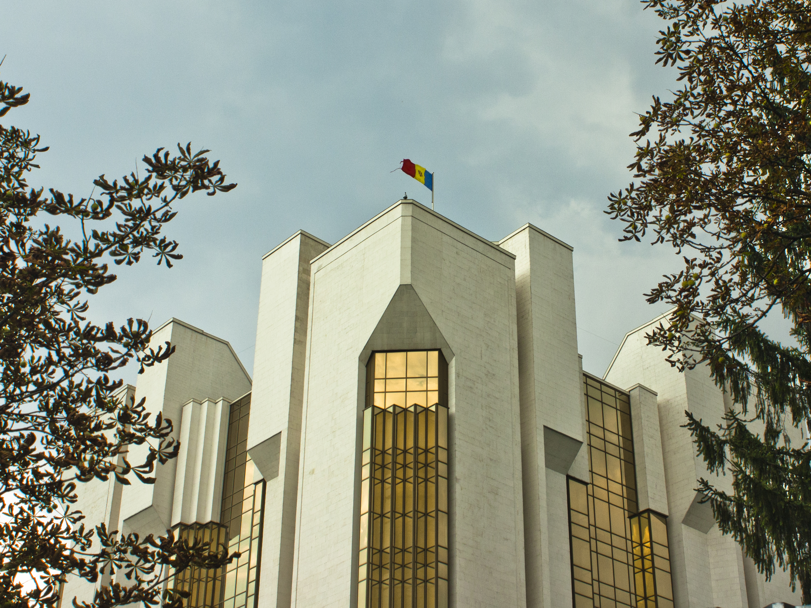 Президентский дворец в Кишинёве